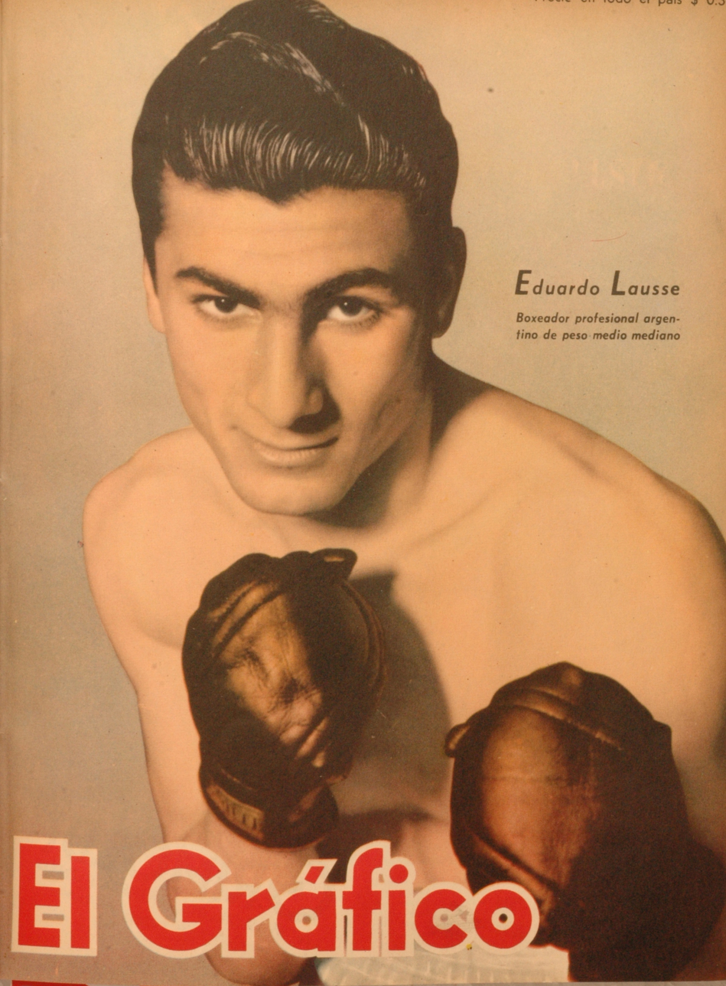 El Grafico del 21 de Noviembre de 1947. Edicion 1480